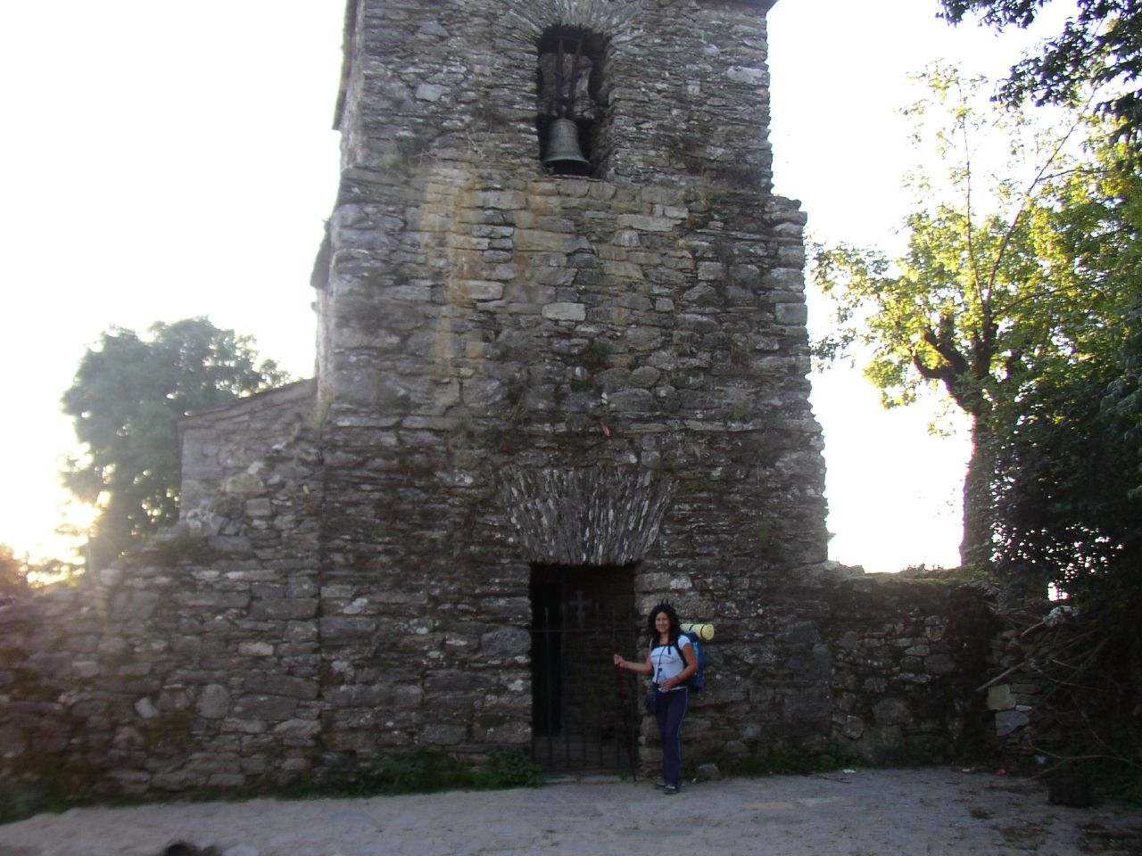 Iglesia San Xoán de Hospital da Condesa: En Hospital da Condesa estuvo ubicado uno de los más antiguos hospitales de peregrinos, fundado en el siglo IX por doña Egilo, esposa del Conde Gantón, de donde le viene el nombre al pueblo. La iglesia de San Xoán que podemos contemplar aquí, tiene las mismas trazas que la de Santo Estevo de Liñares y otras pequeñas iglesias de este tramo del camino.